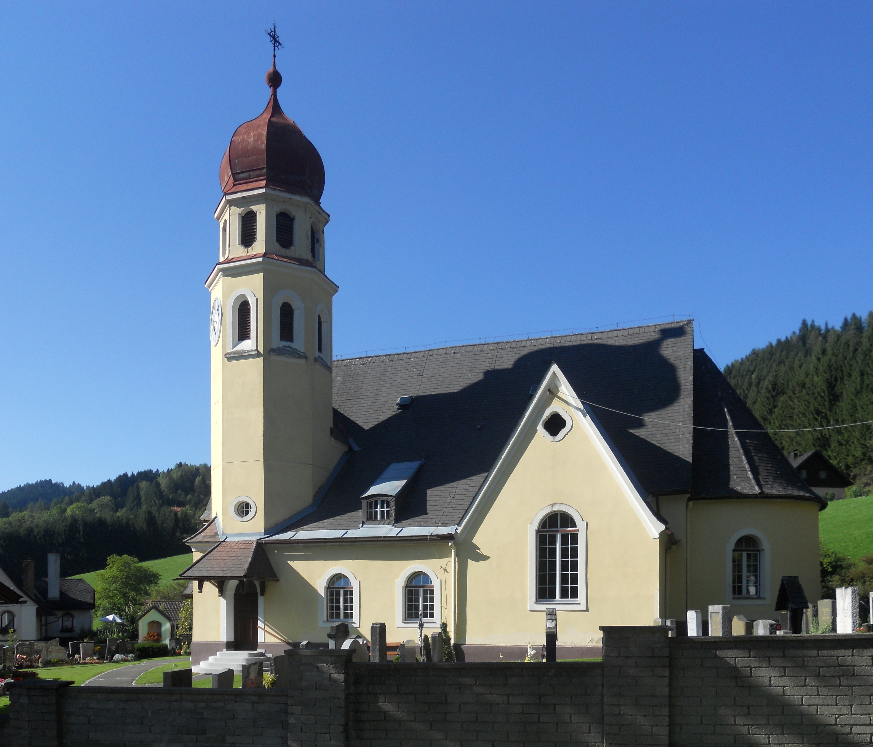 Kath. Pfarrkirche hl. Thomas und Friedhof